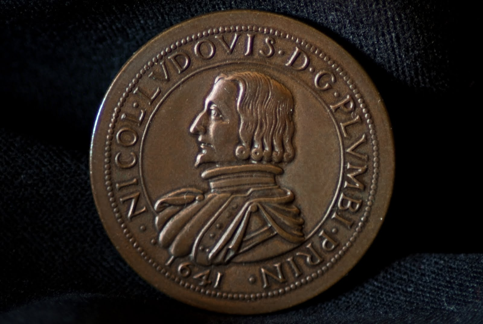 Niccolò I Ludovisi, principe di Piombino - Signore di Gesualdo